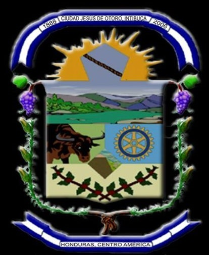 Escudo del municipio de Jesus de Otoro